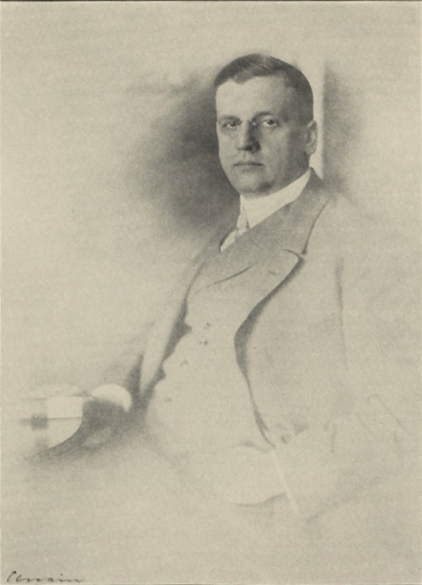 Eduard Lyonel Wehner, Foto von Adolf Friedrich Elnain (1877–1945)